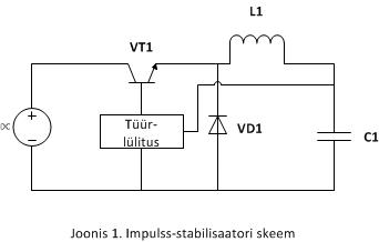 Impulss stabilisaatori tööskeem